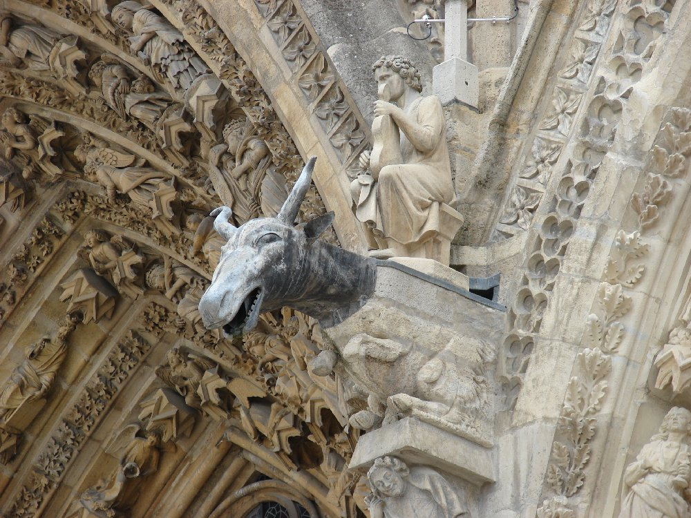 Gárgula da Catedral de Reims- Champagne-França Gargoyle